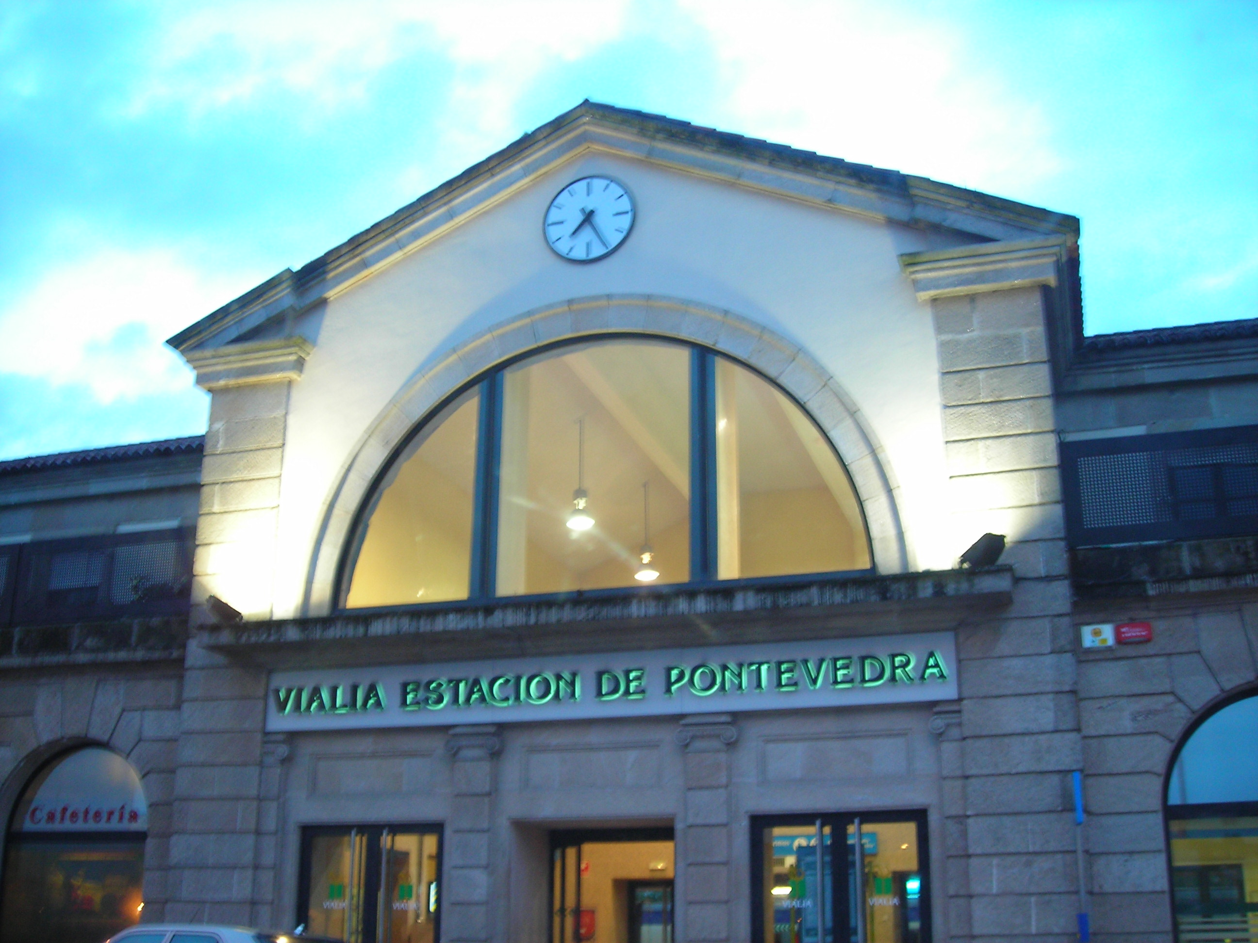 Estación de tren de Pontevedra (Galiza)